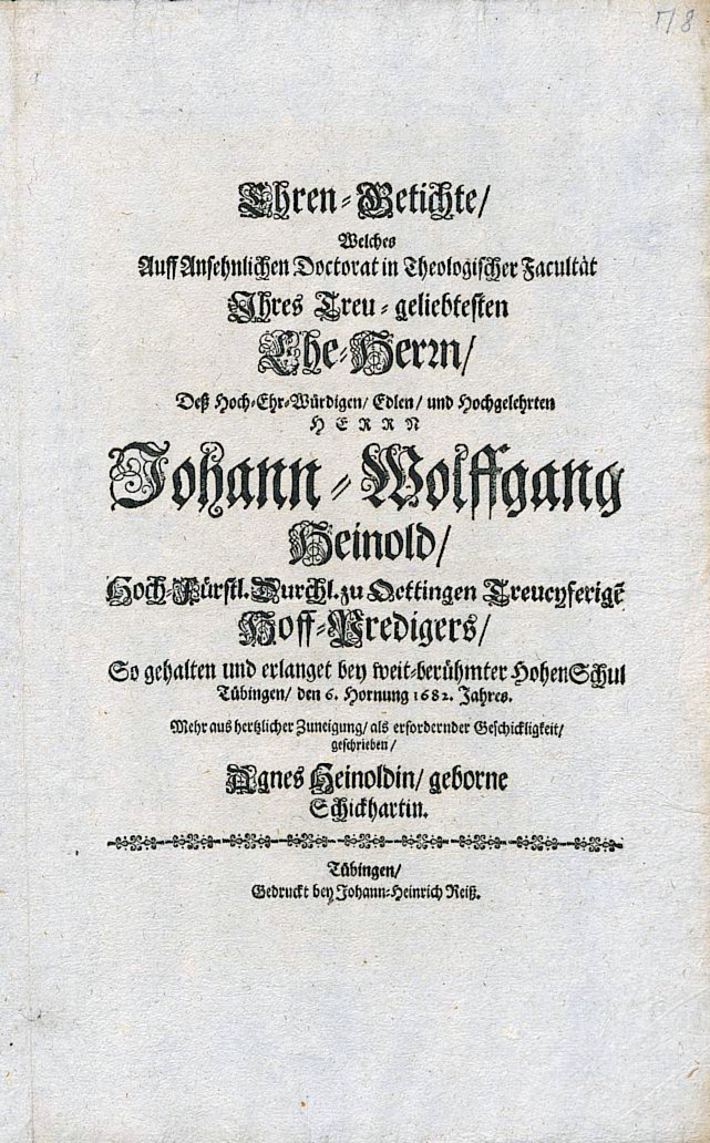 Titelblatt der Schrift Ehren-Getichte / Welches Auff Ansehnlichen Doctorat Theologischer Facultät Ihres Treu-geliebten Ehe-Herrn / Deß Hoch-Ehr-Würdigen/ Edlen/ und Hochgelehrten HERREN Johann-Wolffgang Heinold / Hoch-Fürstl.Durchl. zu Oettingen Treuenferigen Hof-Predigers / So gehalten und erlanget bey weit-berühmter HohenSchul Tübingen/ den 6. Hornung 1682. Jahres. Mehr aus hertzlicher Zuneigung/ als erfordernder Geschickligkeit/ geschrieben/ Agnes Heinoldin/ geborene Schickhartin. Tübingen/ Gedruckt bey Johann-Heinrich Reiß